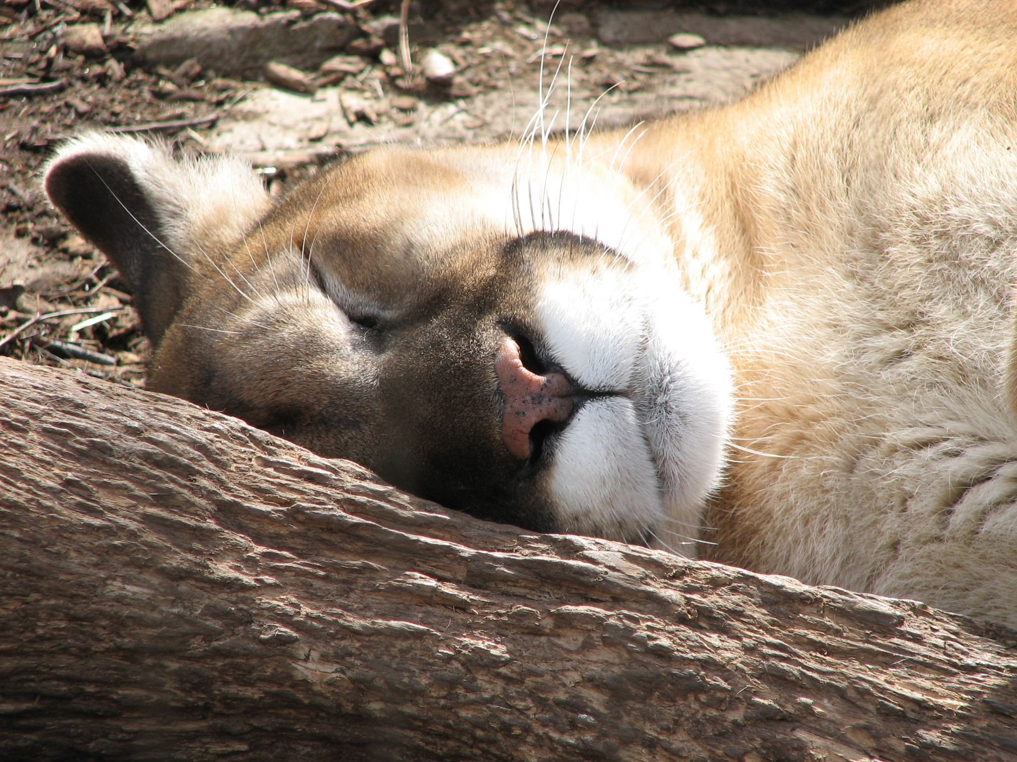 Puma Sleeping - Puma concolor